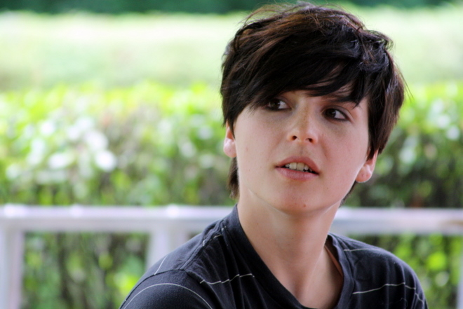 Dorothee Elmiger Das Foto entstand anläßlich der Tage der deutschsprachigen Literatur (Bachmannpreis) in Klagenfurt